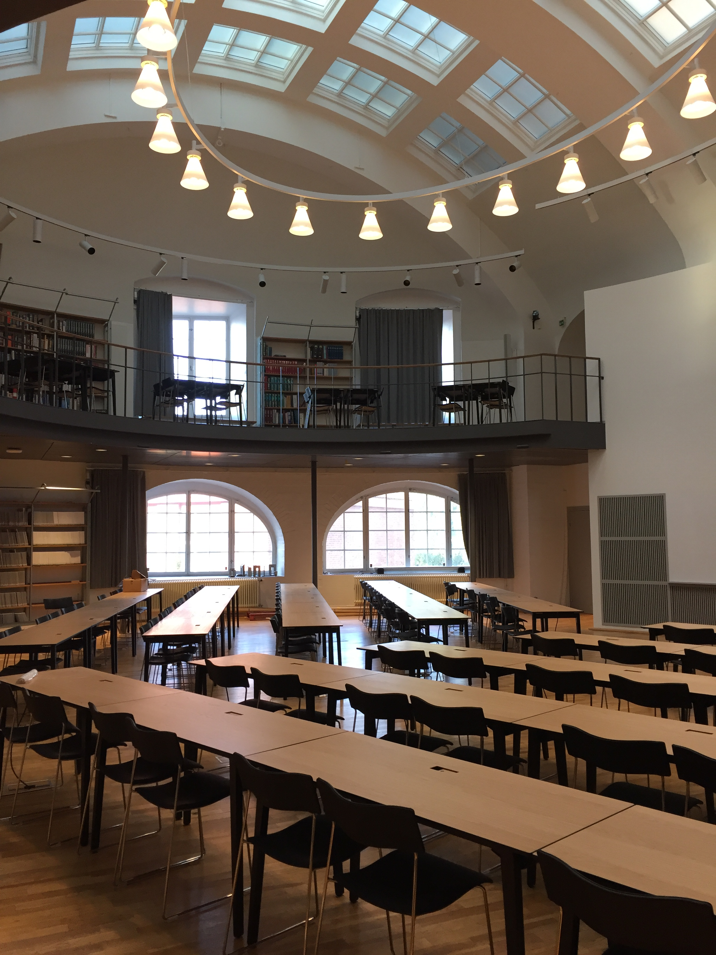 Den tysta läsesalen Ångdomen på KTH Biblioteket